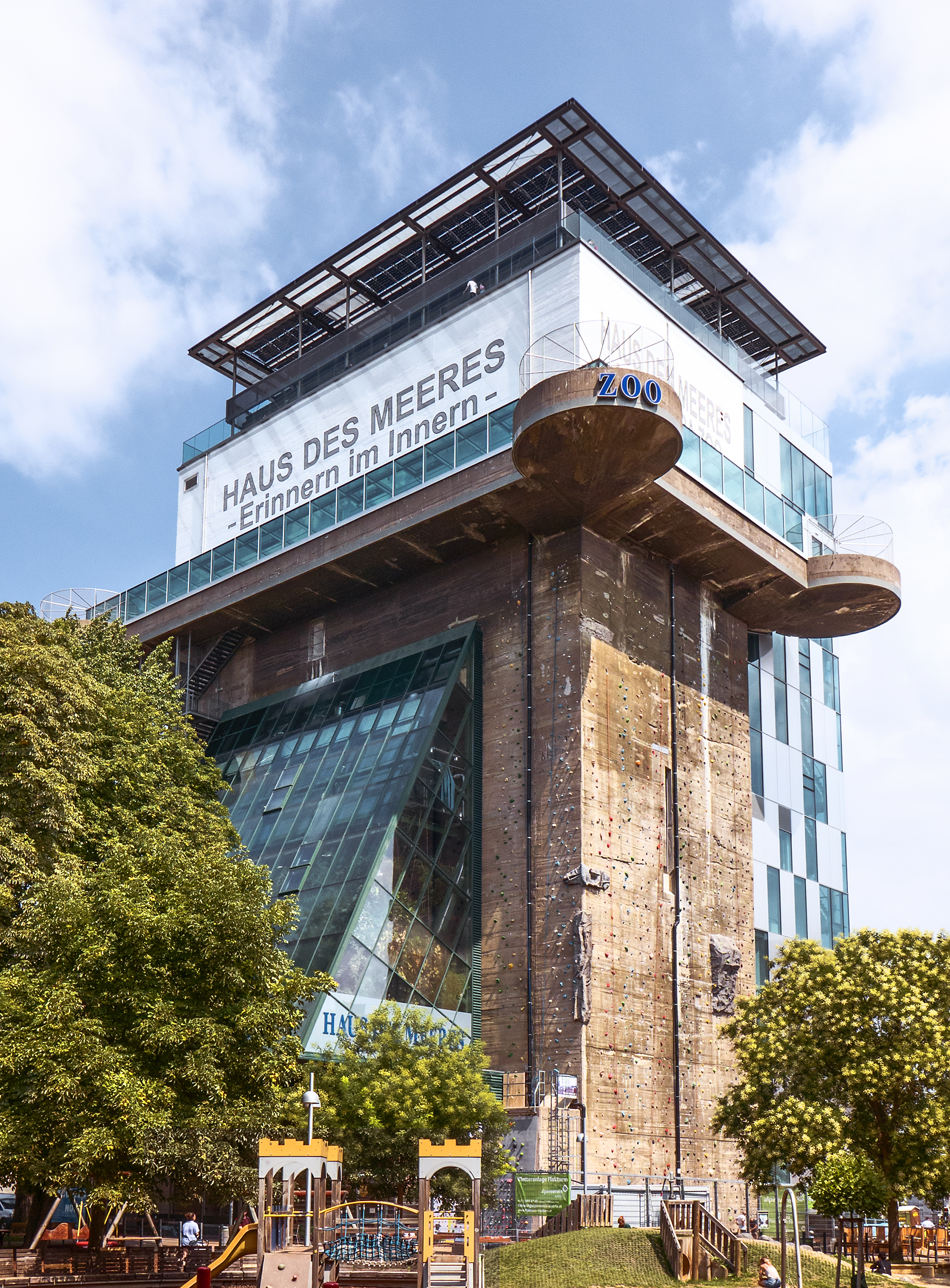 Haus des Meeres in Wien 6